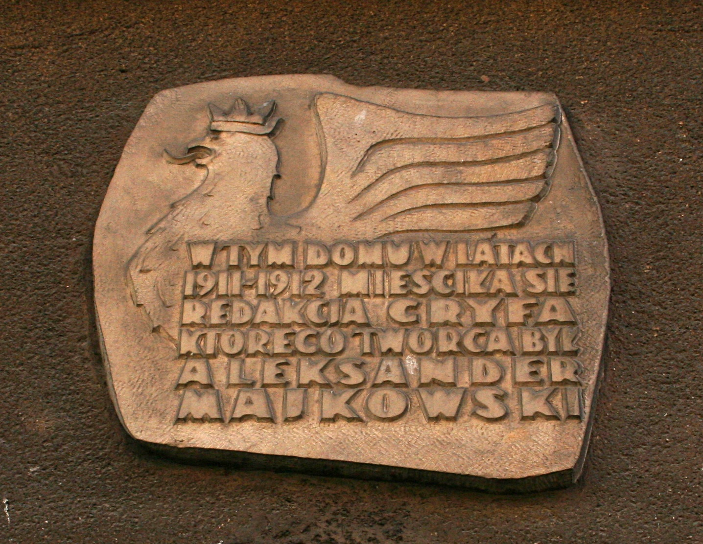 Tablica upamiętniająca siedzibę redakcji "Gryfa" w Gdańsku.